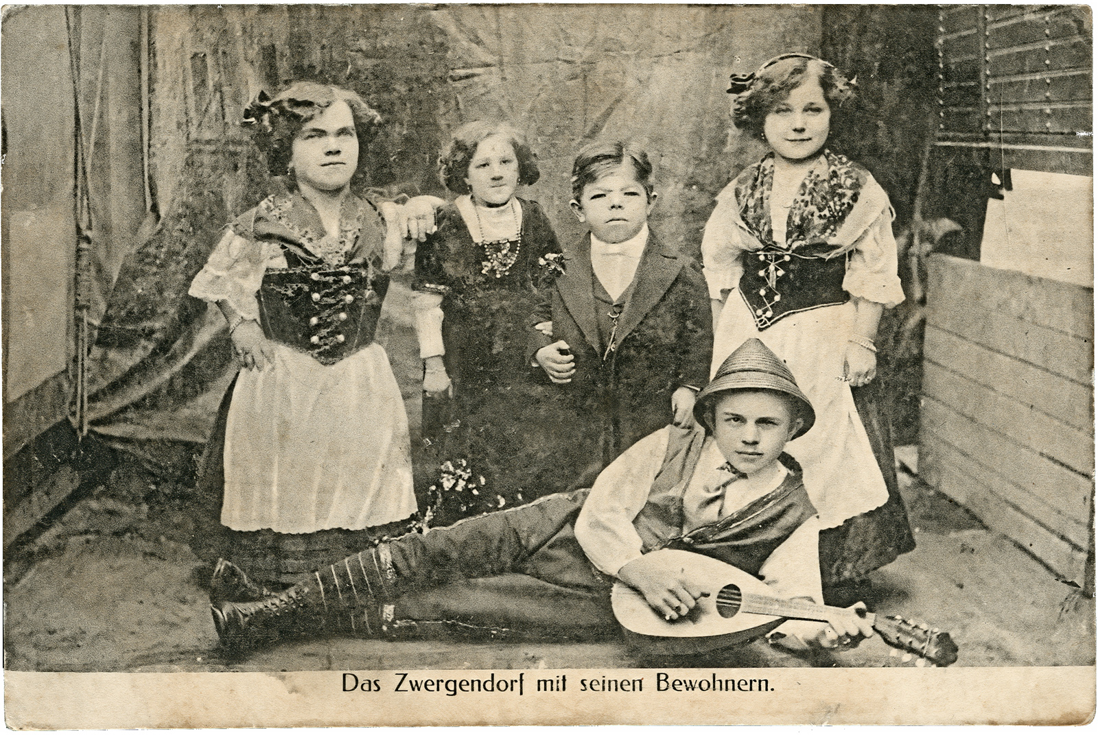 Ansichtskarte ohne Nummer von Ludwig Hemmer. Das Arrangement zeigt "das Zwergendorf mit seinen Bewohnern". Die Szene dürfte entweder auf dem alten Schützenplatz oder auf dem Gelände des Zoos von Hannover aufgenommen worden sein.